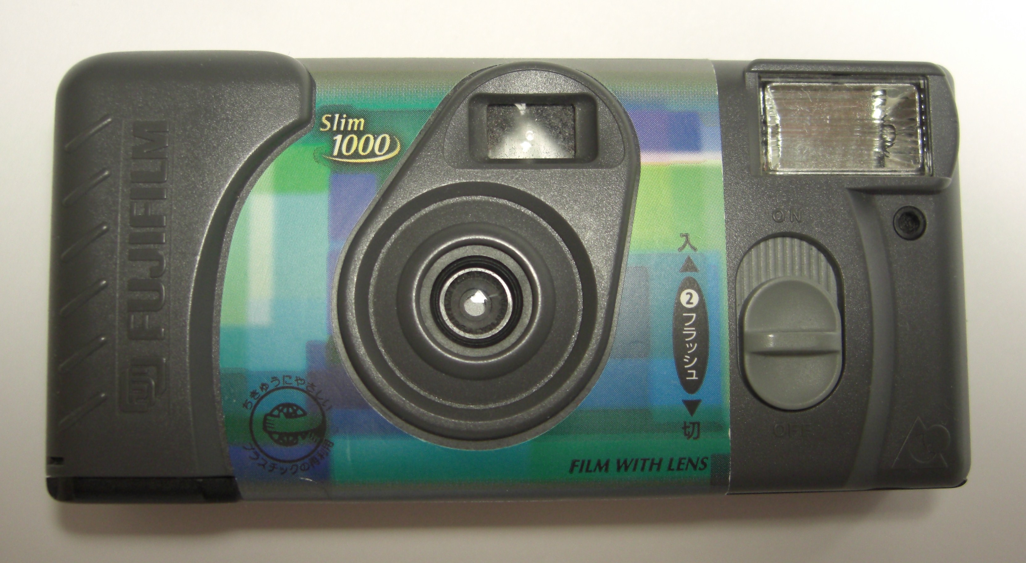 写ルンです Slim1000